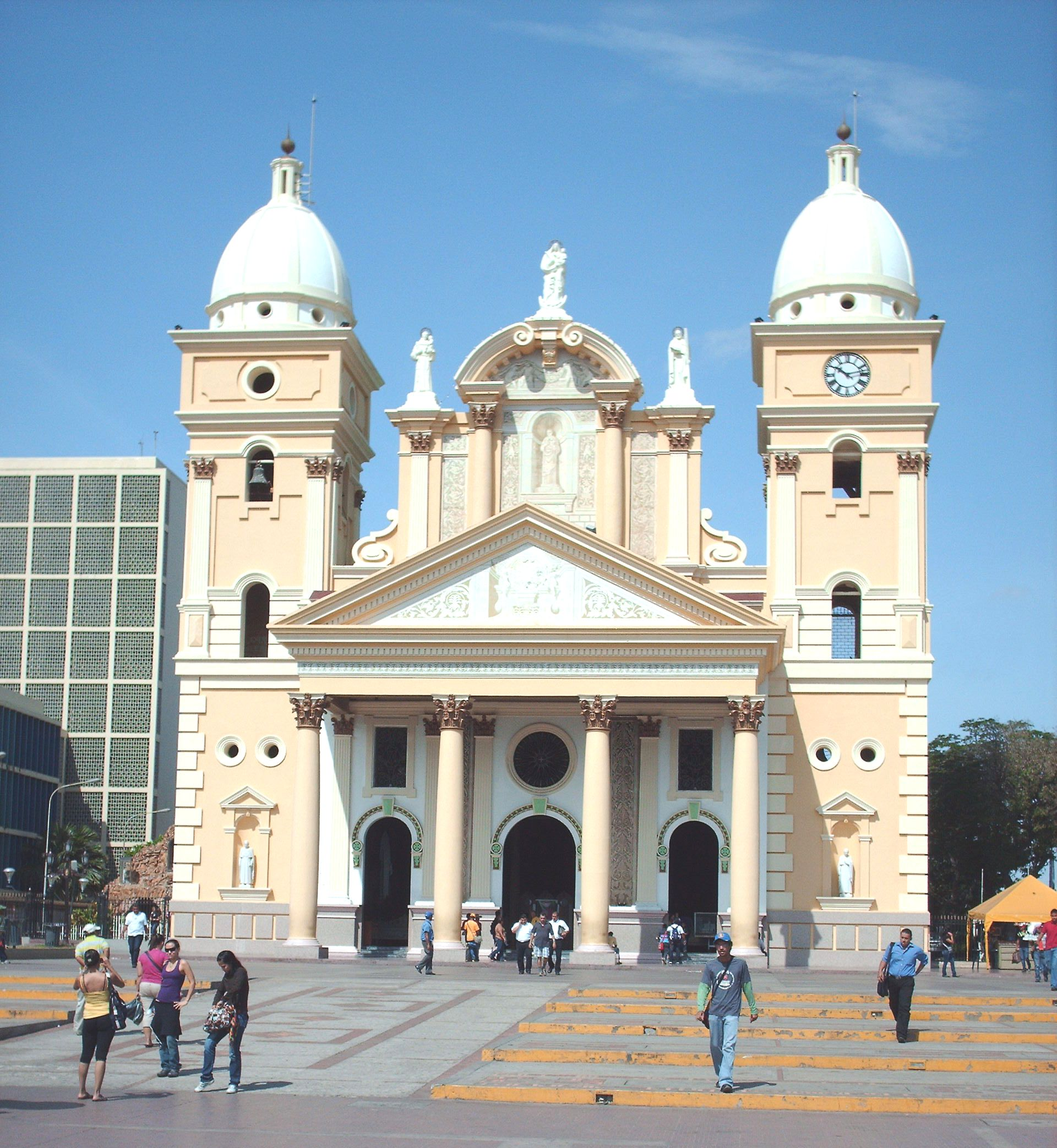 Fachada de la Basílica de la Virgen de Chiquinquirá, Maracaibo, Estado Zulia, Venezuela.